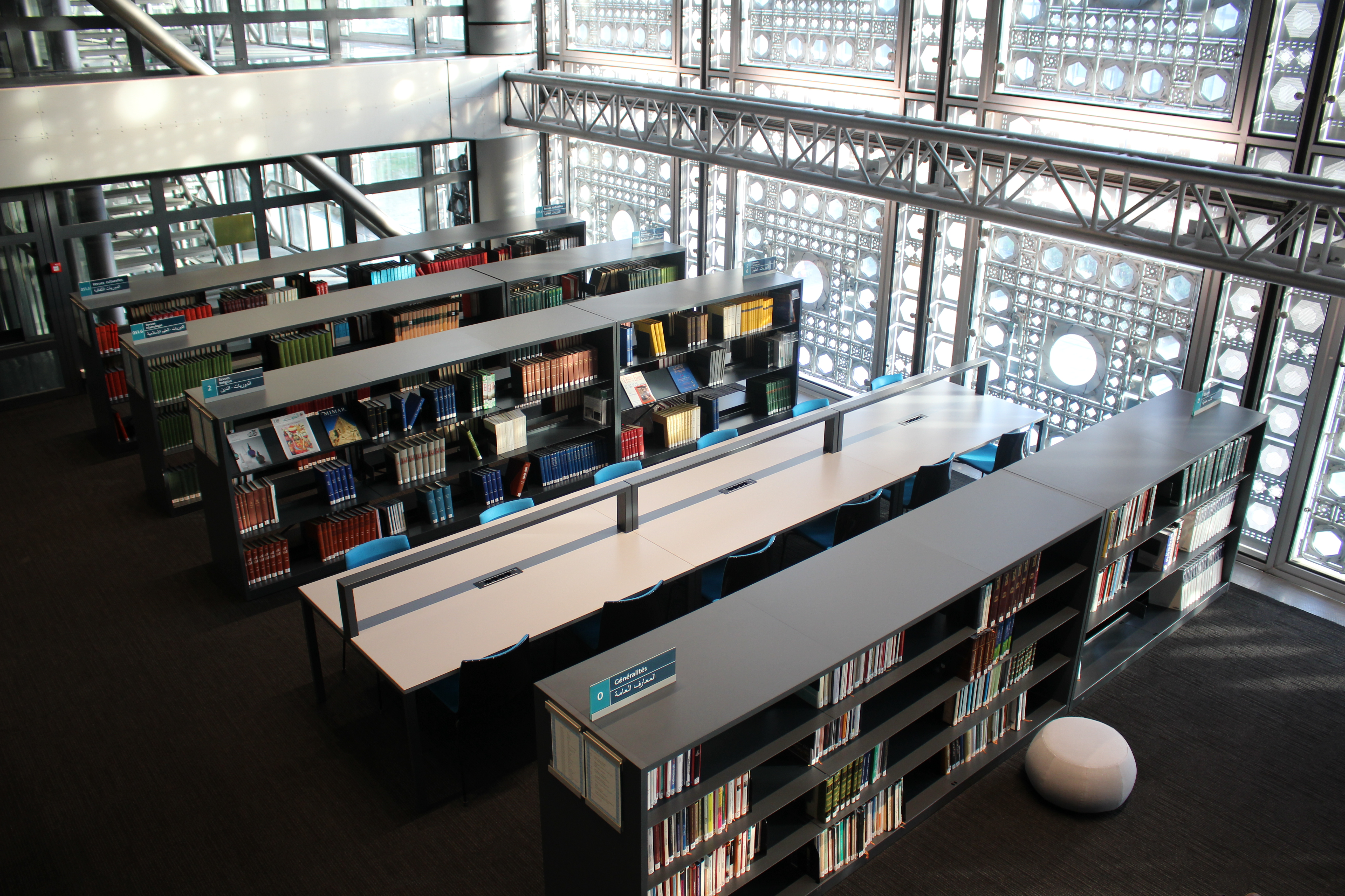 Bibliothèque de l'Institut du monde arabe Bibliothèque de l'Institut du monde arabe, 1 Rue des Fossés Saint-Bernard, 75005 Paris, France.